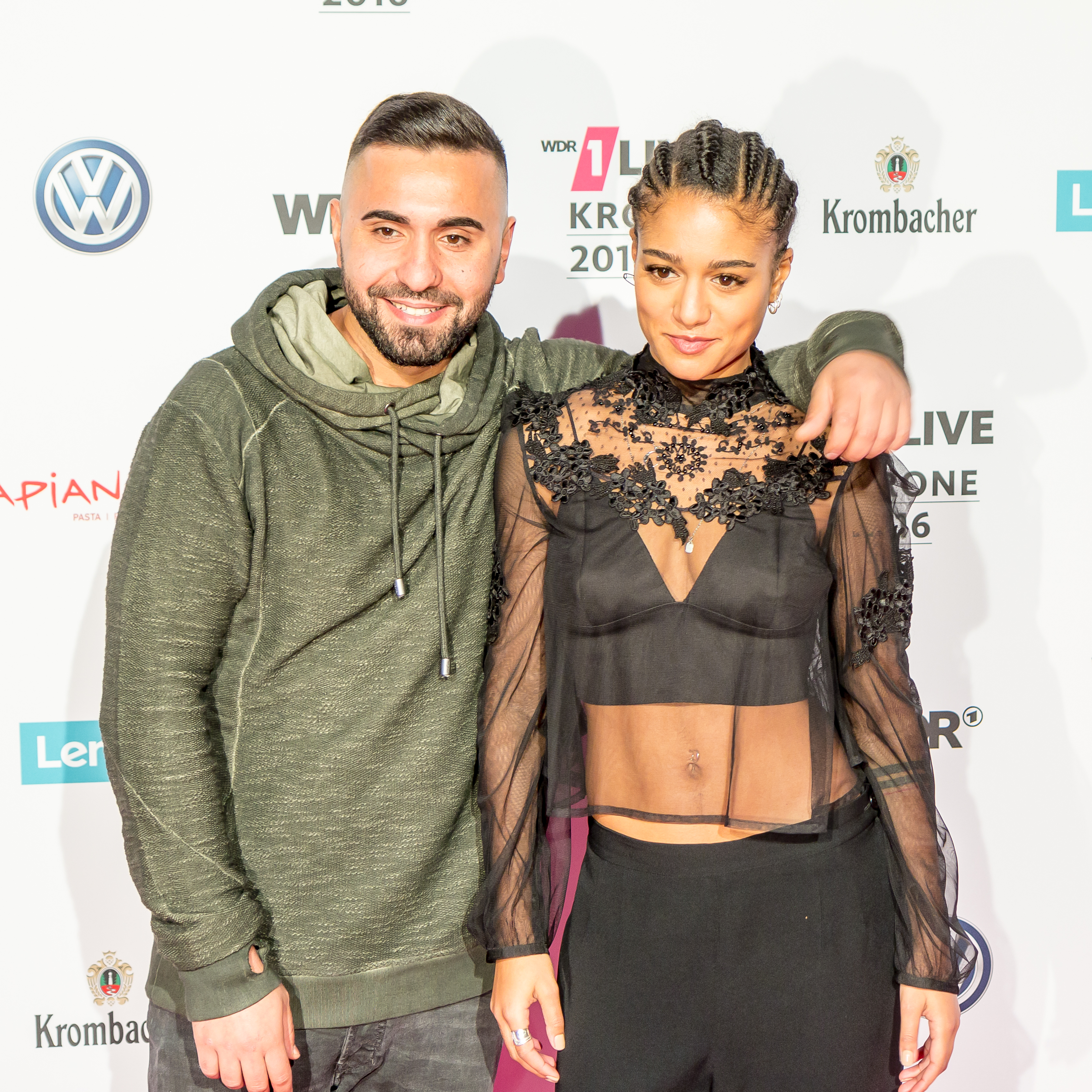 1LIVE Krone 2016 - 1700 - Roter Teppich - MoTrip und Lary